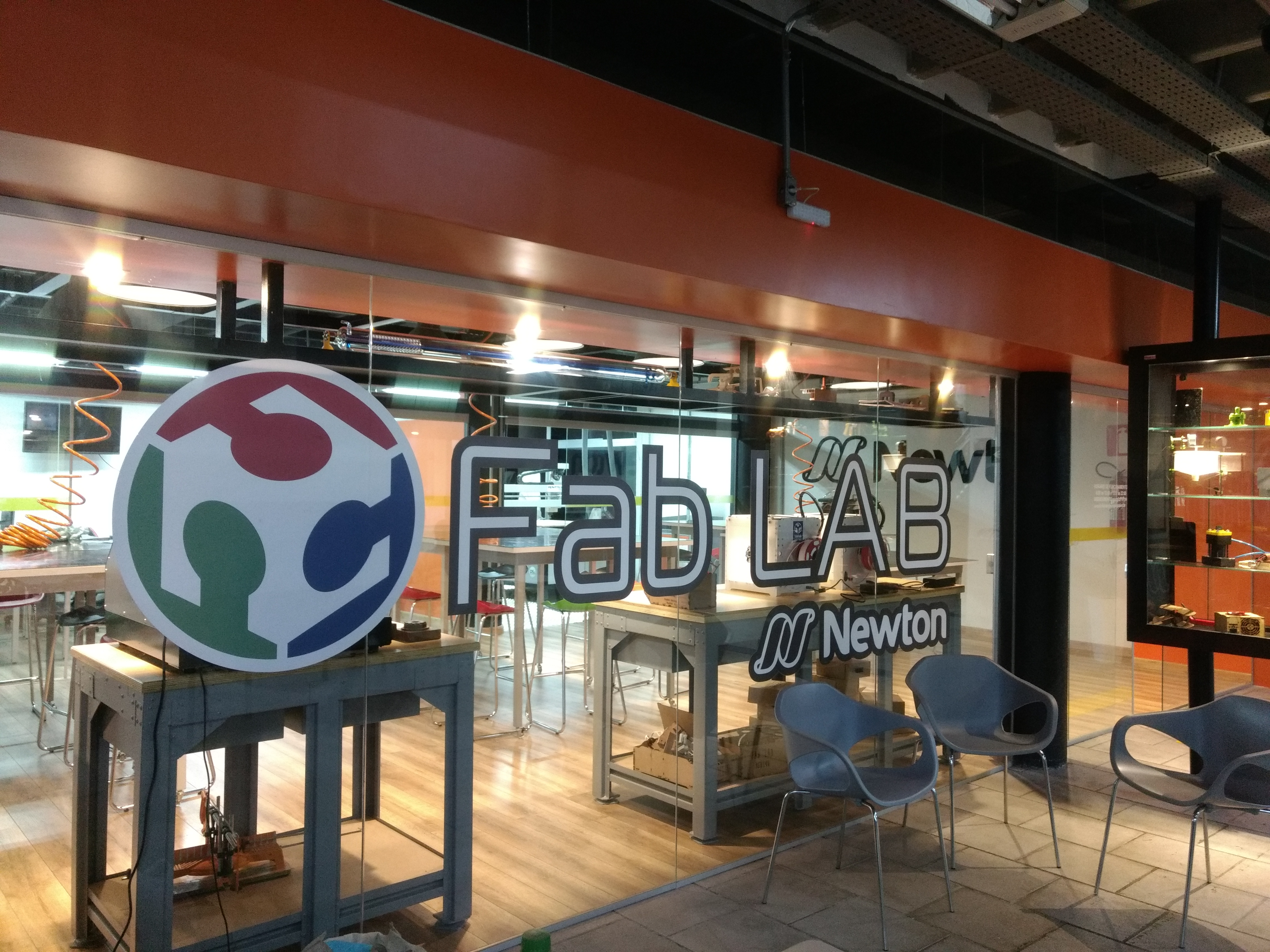 Faixada do FabLAB Newton